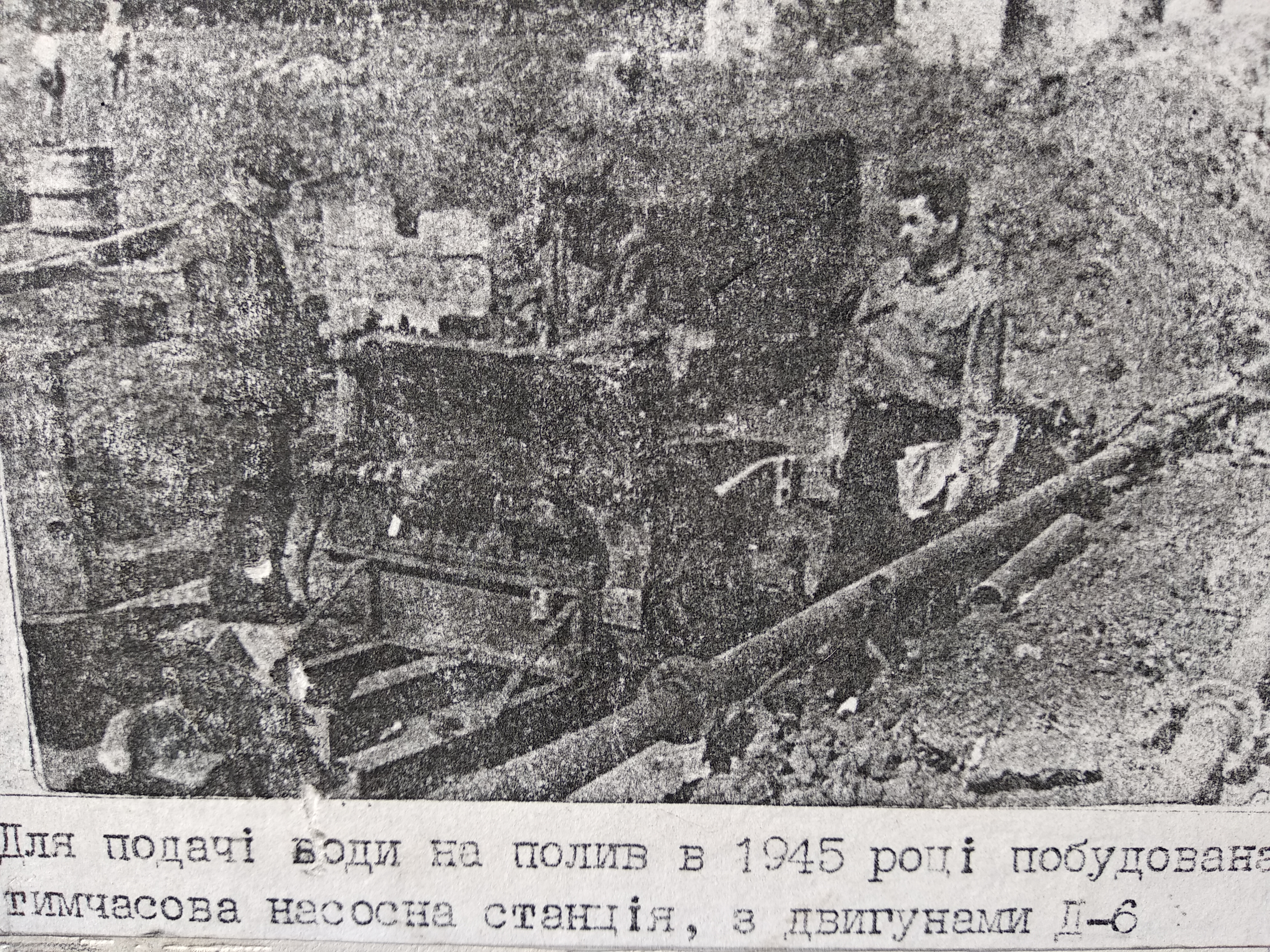 Тимчасова насосна станція 1945 рік